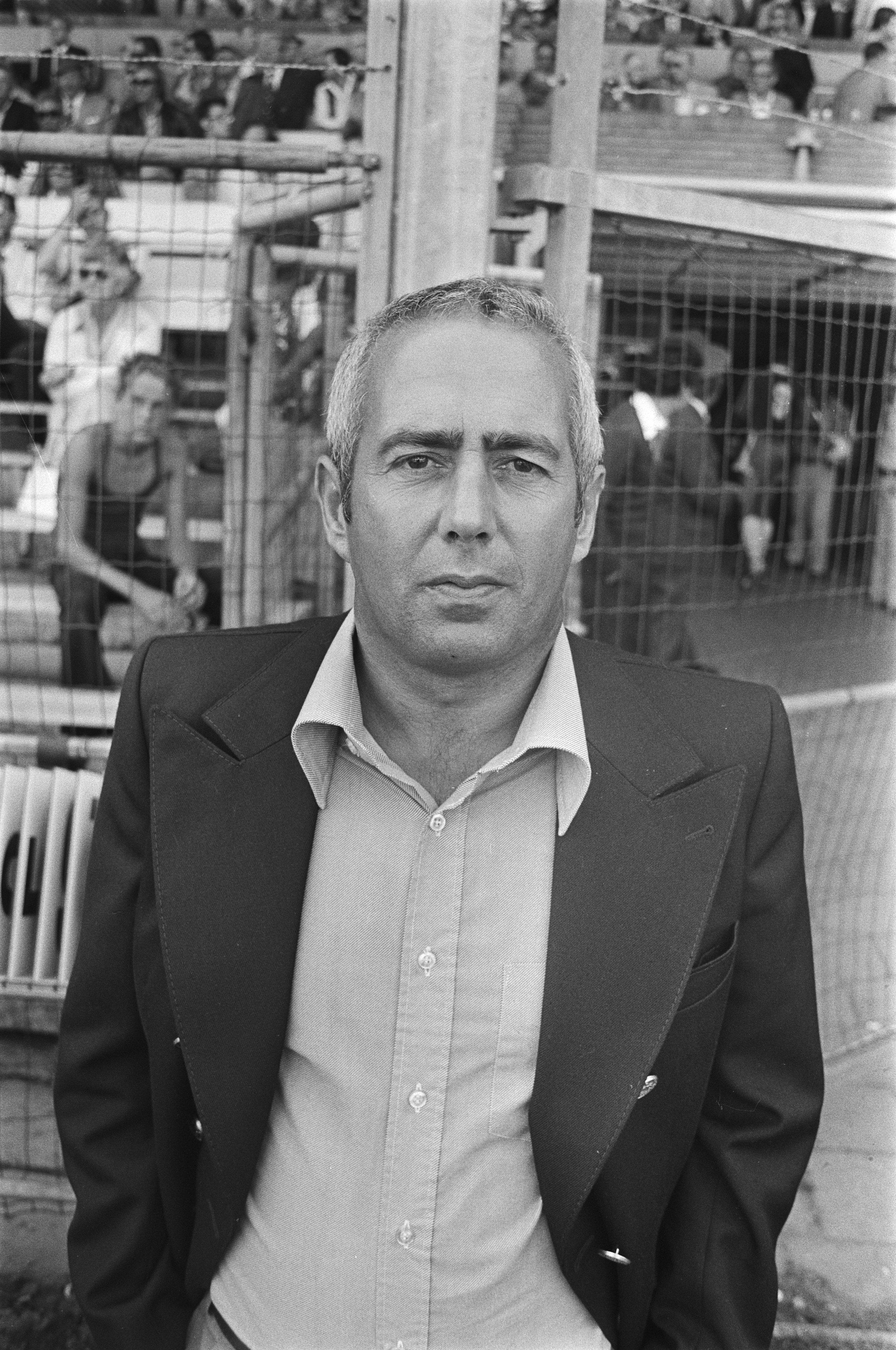 Collectie / Archief : Fotocollectie Anefo Reportage / Serie : [ onbekend ] Beschrijving : Ajax tegen De Graafschap 1-0, graafschaptrainer E. Teunissen Datum : 22 augustus 1976 Trefwoorden : sport, voetbal Persoonsnaam : E. Teunissen Instellingsnaam : Graafschap, De Fotograaf : Bogaerts, Rob / Anefo Auteursrechthebbende : Nationaal Archief Materiaalsoort : Negatief (zwart/wit) Nummer archiefinventaris : bekijk toegang 2.24.01.05 Bestanddeelnummer : 928-7407